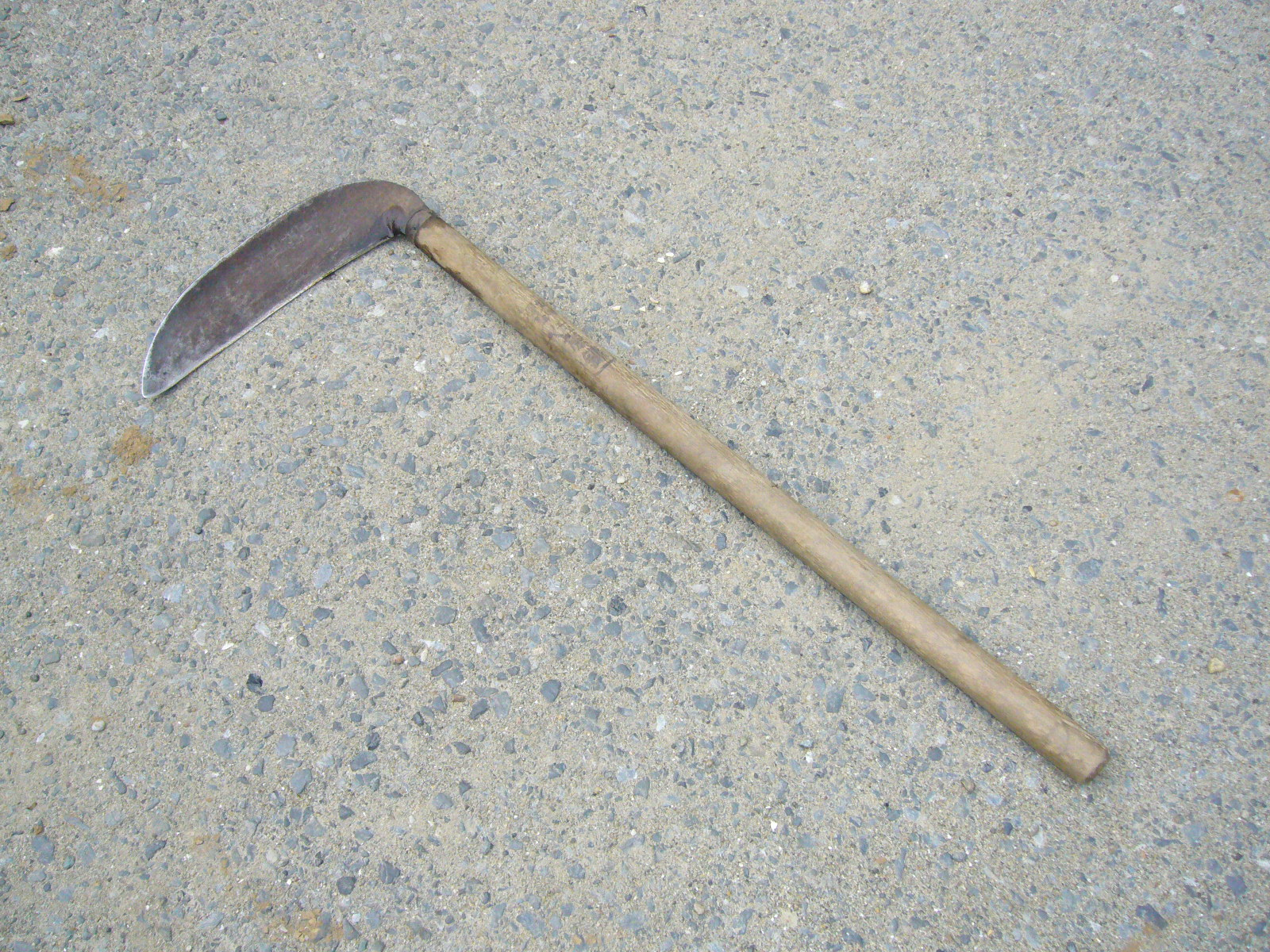 japanese-sickle,kama,katori-city,japan